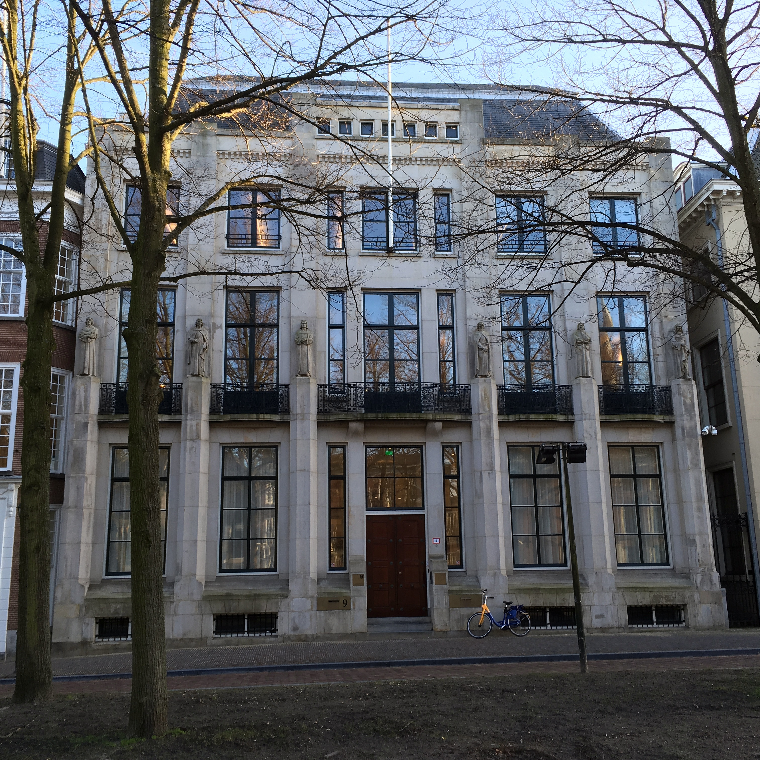 Lange Voorhout 9, Den Haag